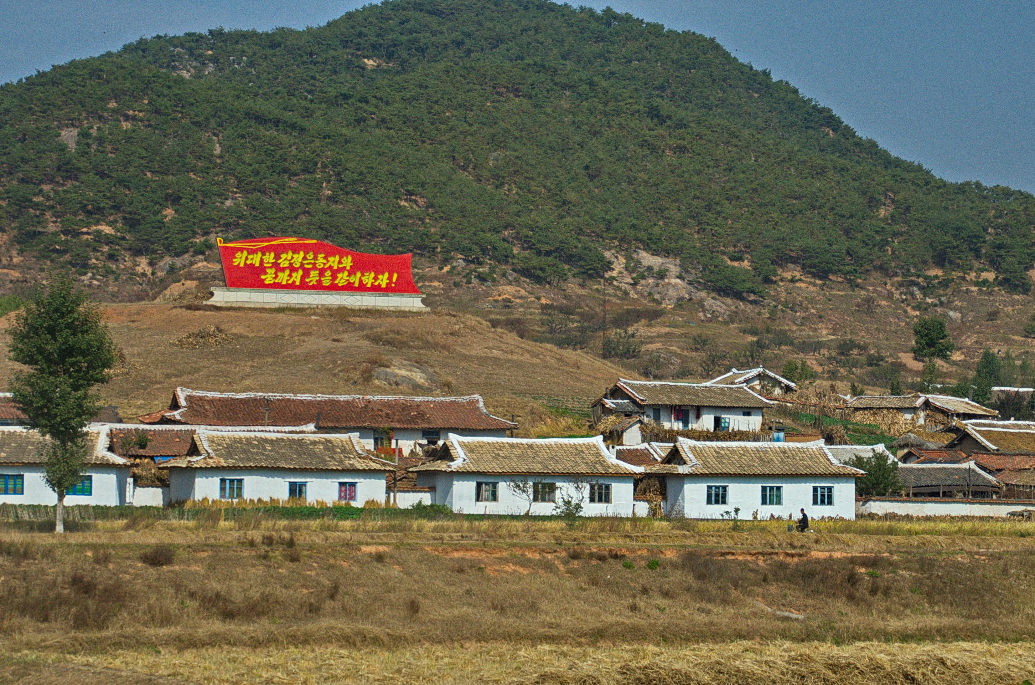 Nordkorea 2015 - Bahnfahrt von Pjöngjang nach China